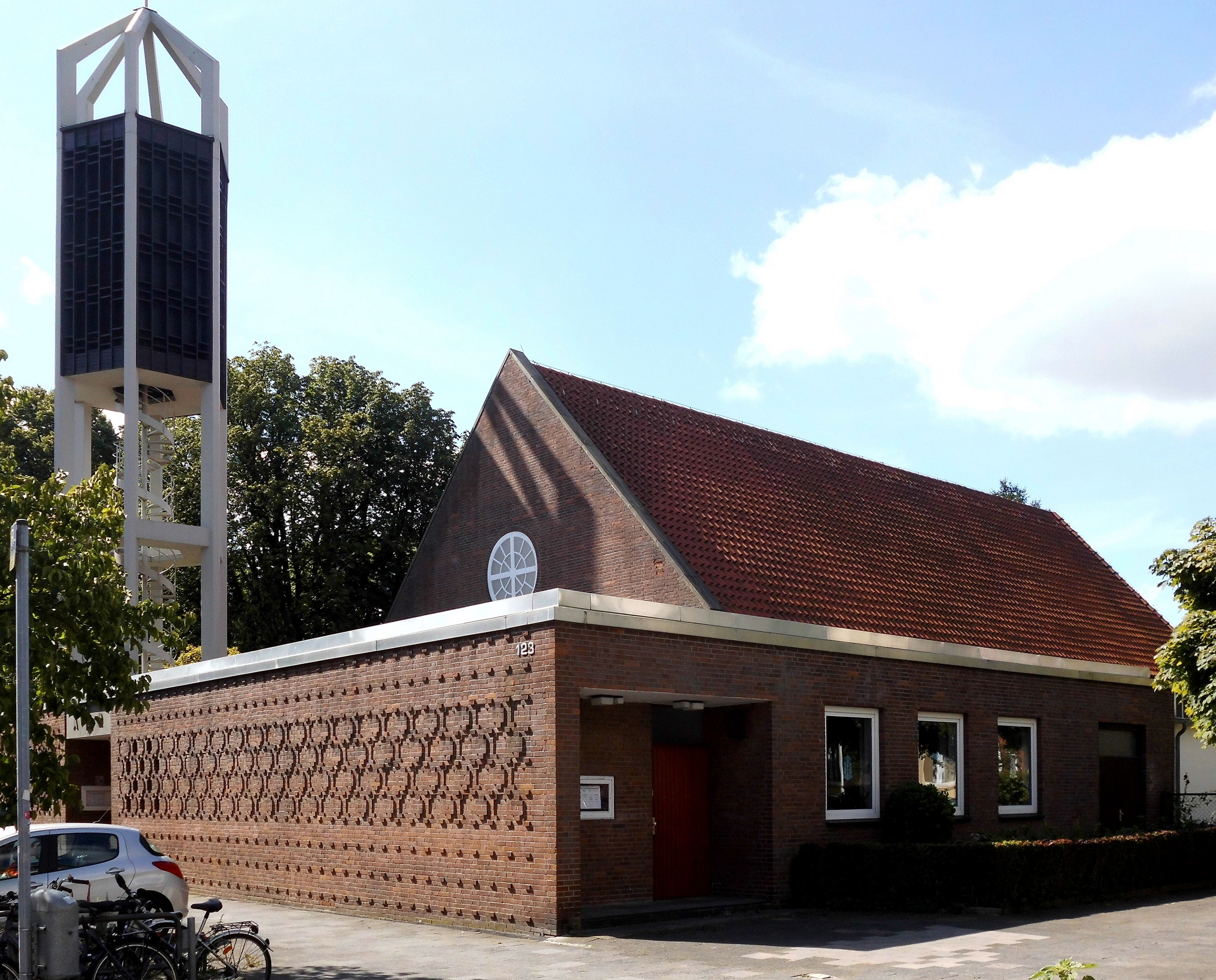 Vicelinkirche im Kieler Stadtteil Südfriedhof. Siehe auch Detailaufnahme des Turms